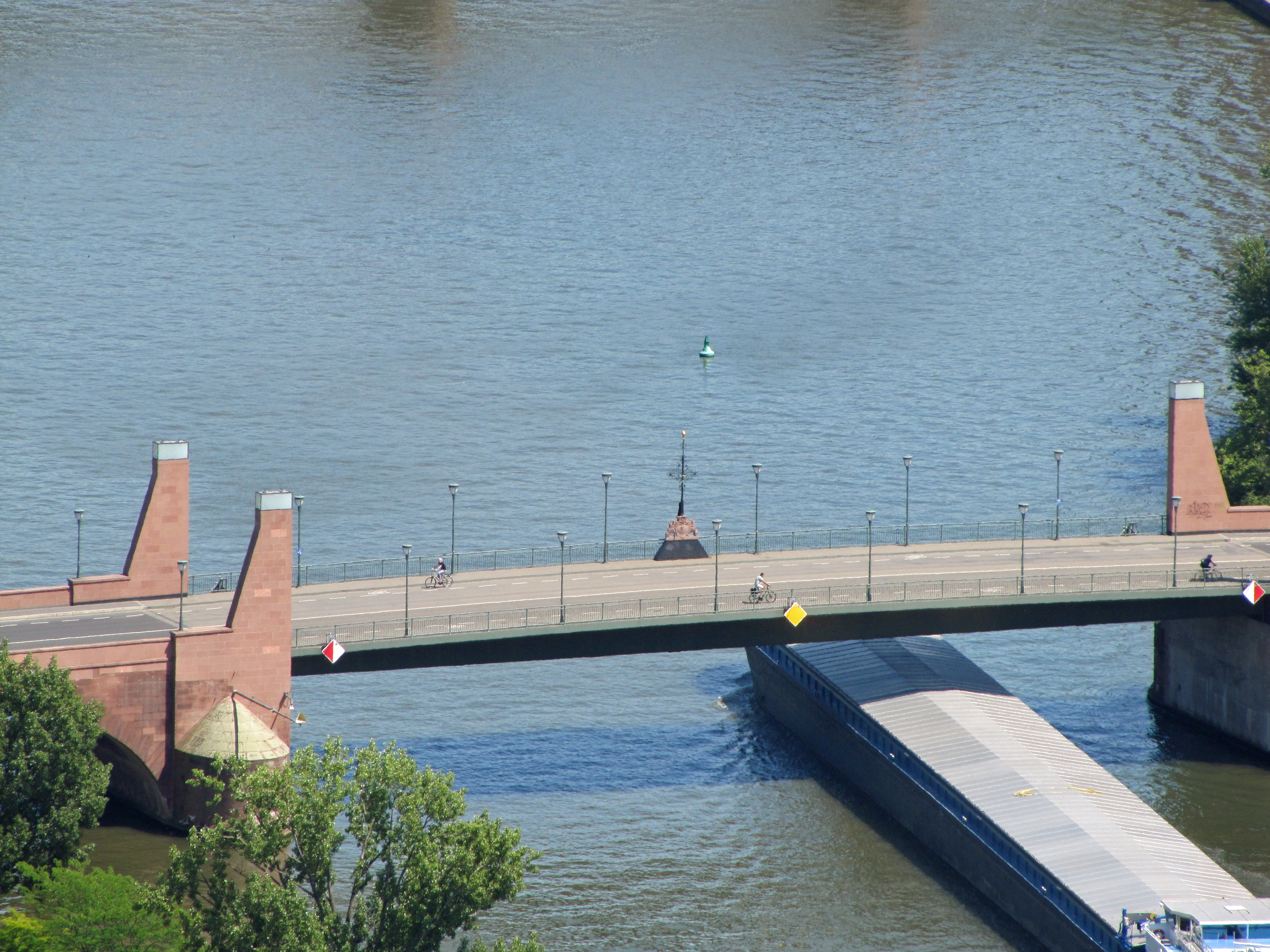 Alte Brücke mit Brickegickel, Juni 2018 über dem Main in Frankfurt. Ansicht vom Maintower.